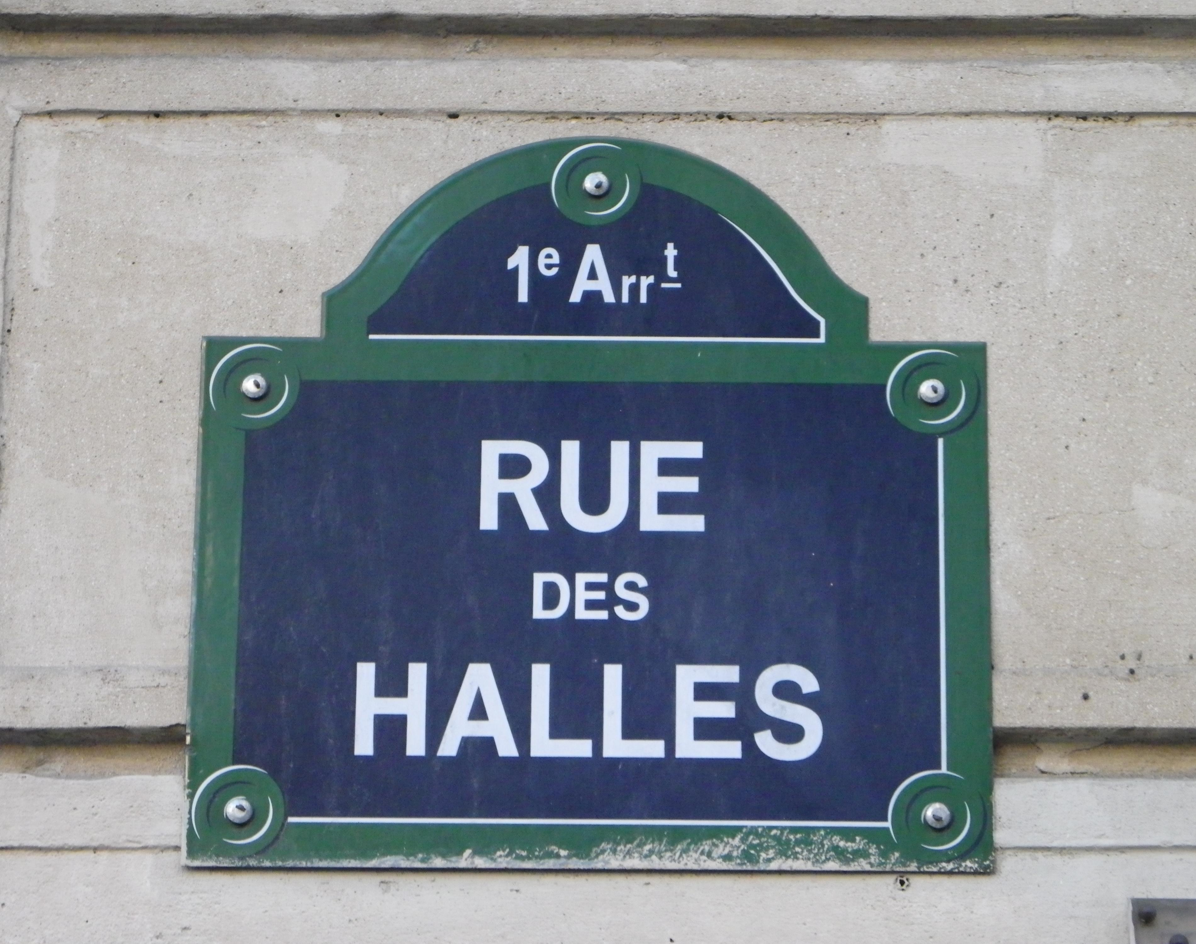 Plaque de la rue des Halles à Paris